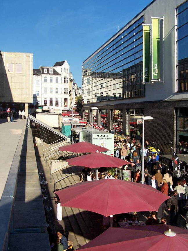 Höhlerfest, Gera, Germany